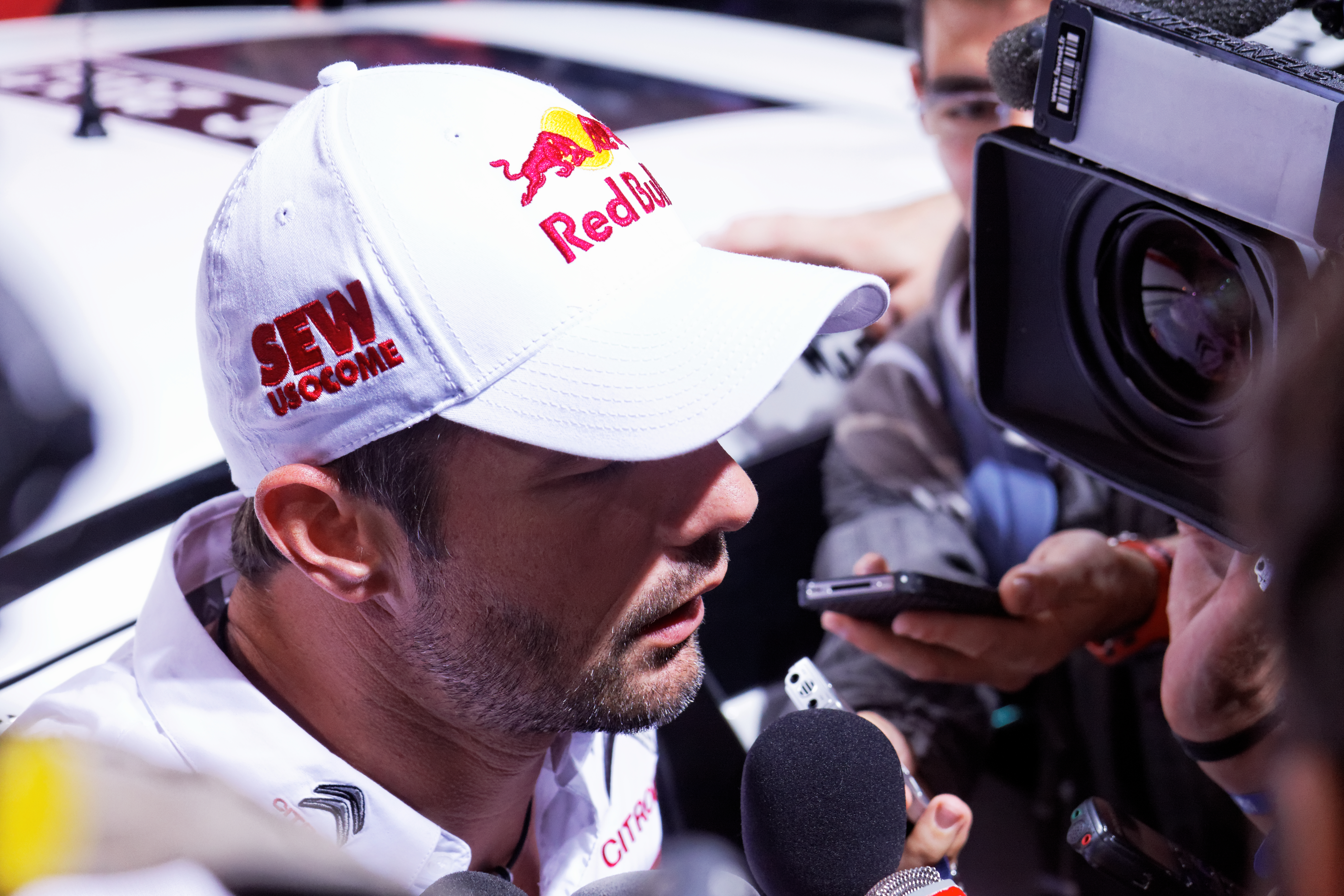 Sébastien Loeb interviewé lors du Mondial de l'Automobile de Paris 2012.